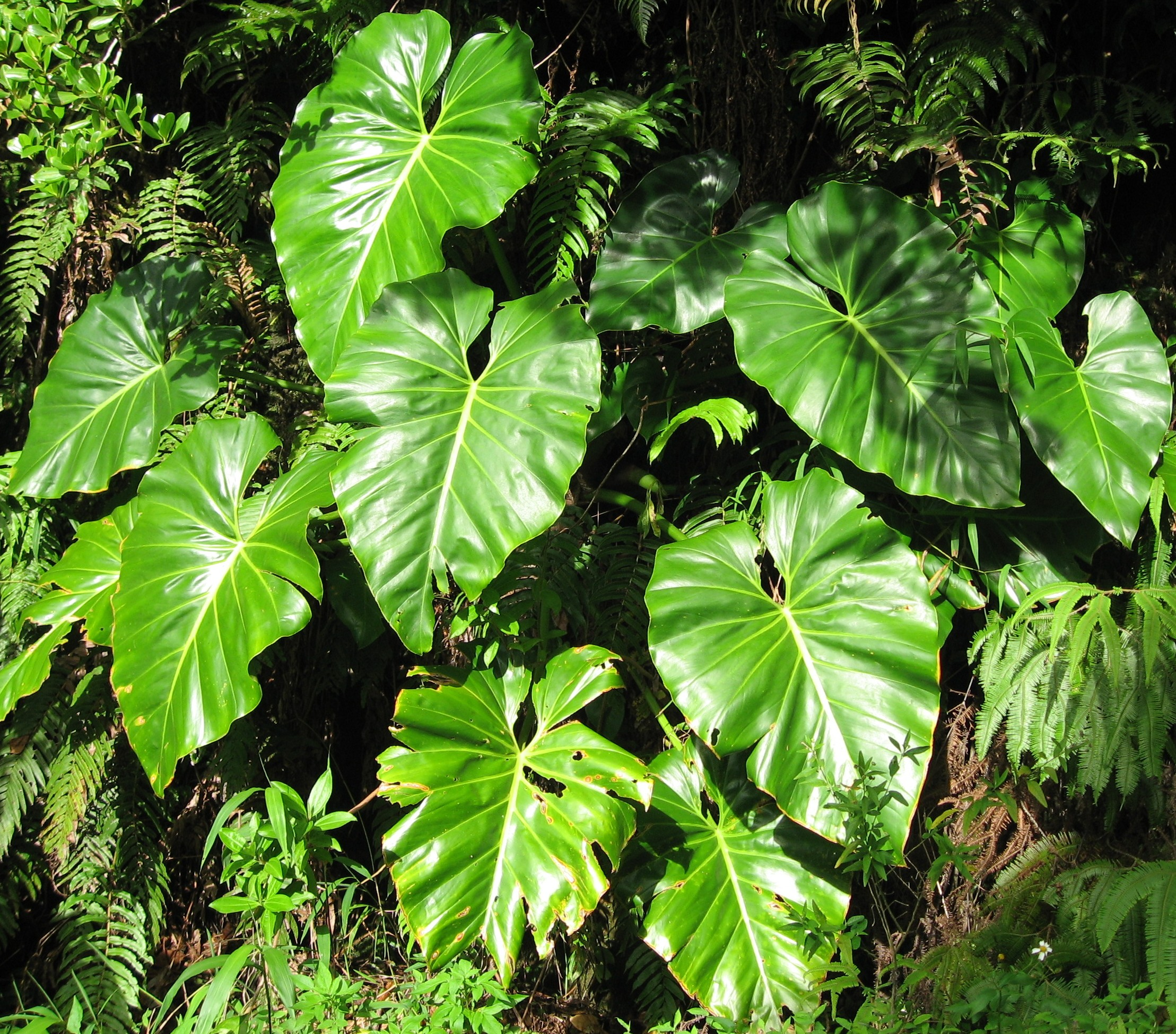 Philodendron giganteum au Parc des Mamelles en Guadeloupe, Basse-Terre